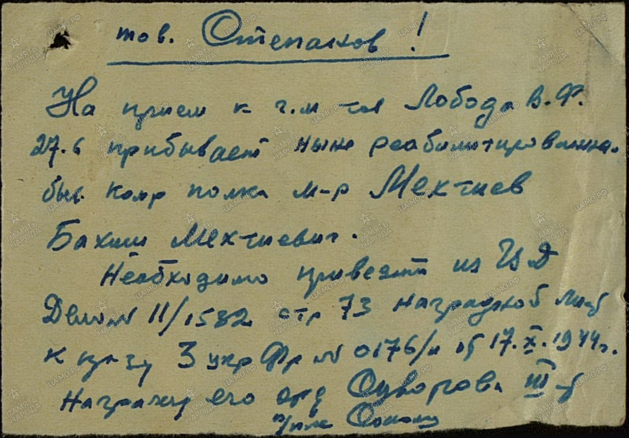 Распоряжение товарищу Степанову принять реабилитированного полковника Б.М. Мехтиева для возвращения Ордена Суворова III степени